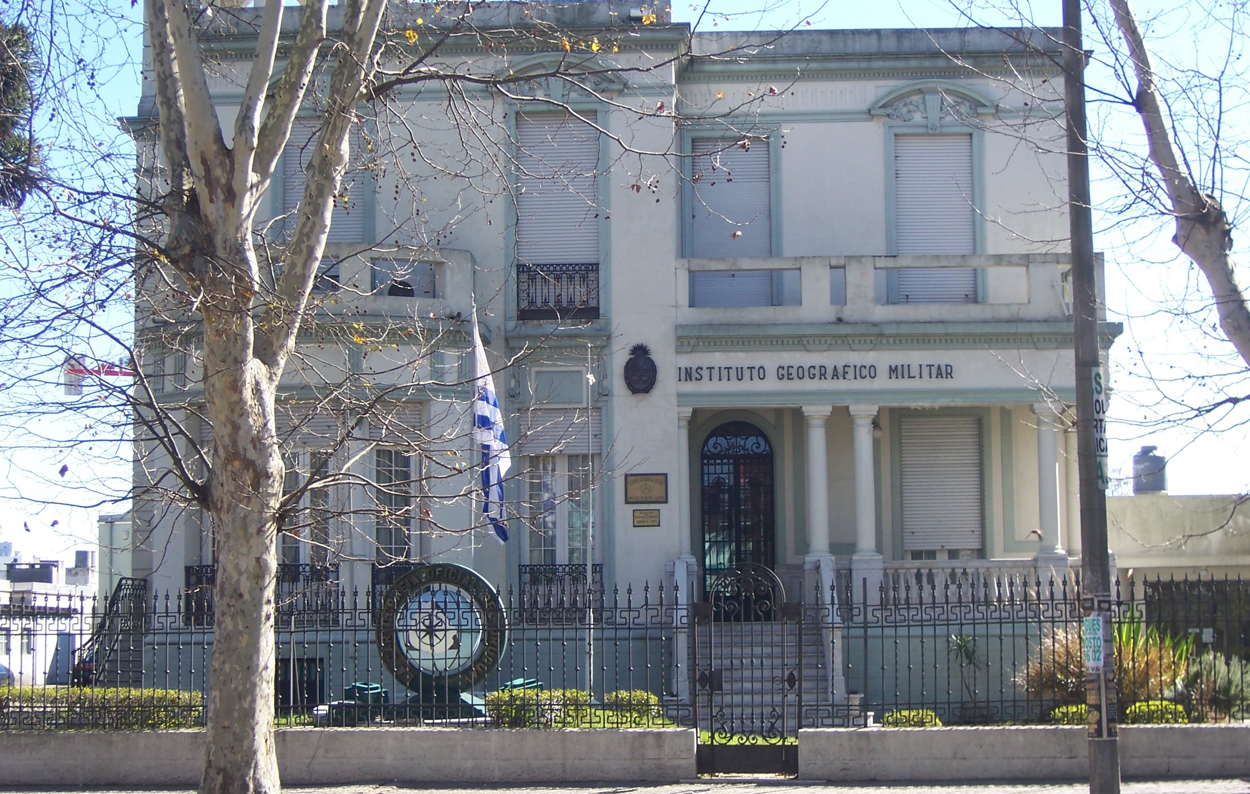 Edificio S.G.M.